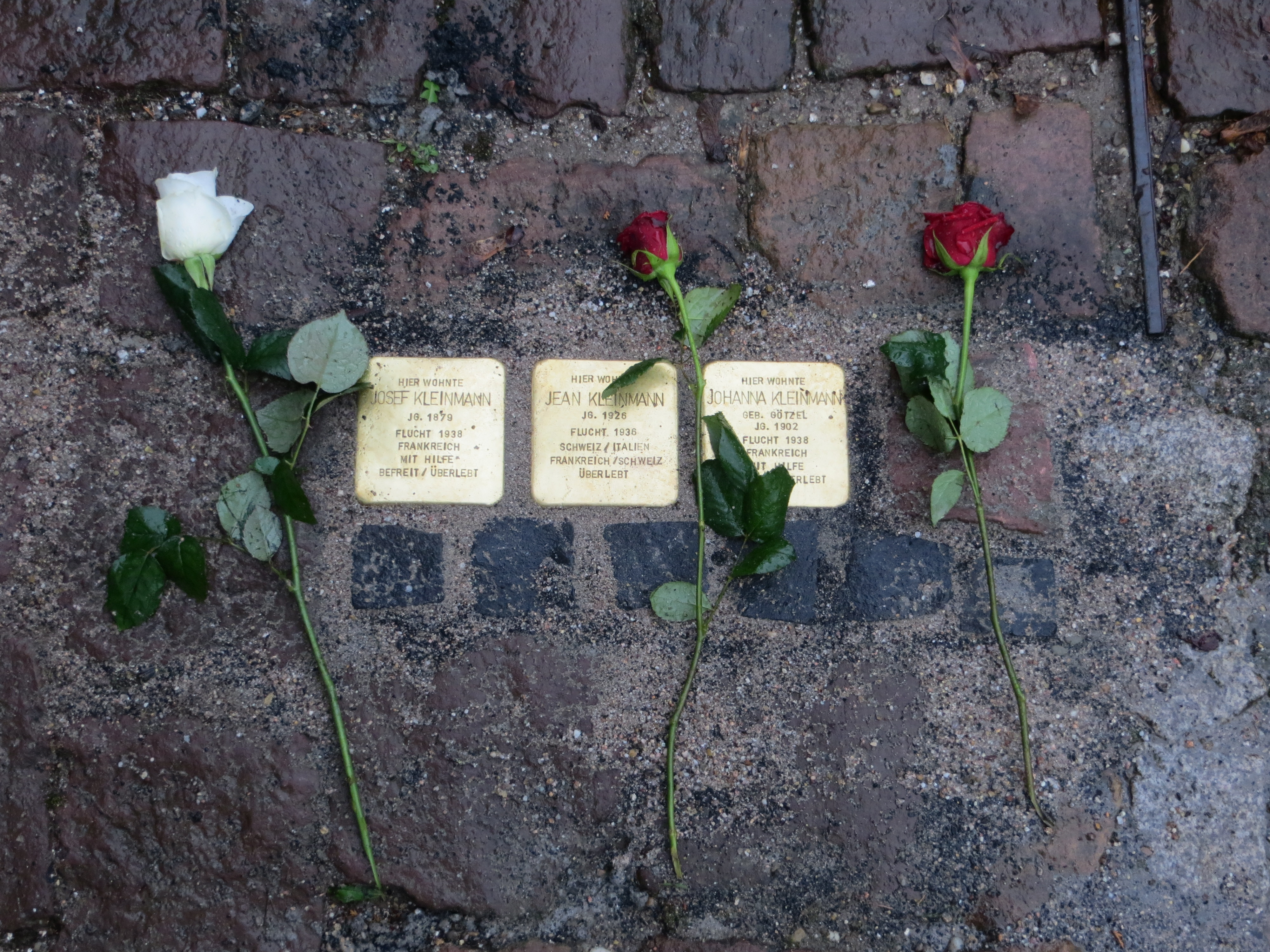 Stolpersteinverlegung am 08. November 2013 Familie Kleinmann vor dem Haus Kronprinzenstraße 1 Baden-Baden